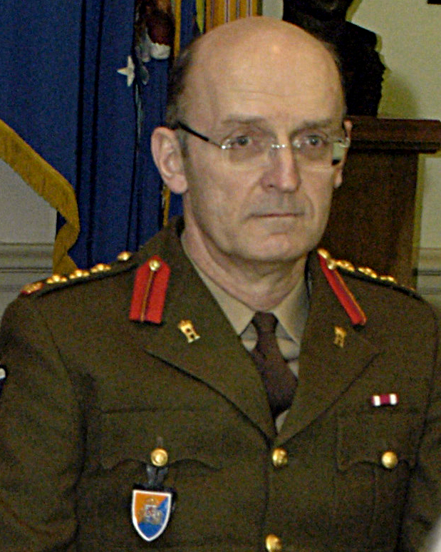 De Colonel Nico Ries, 2005.